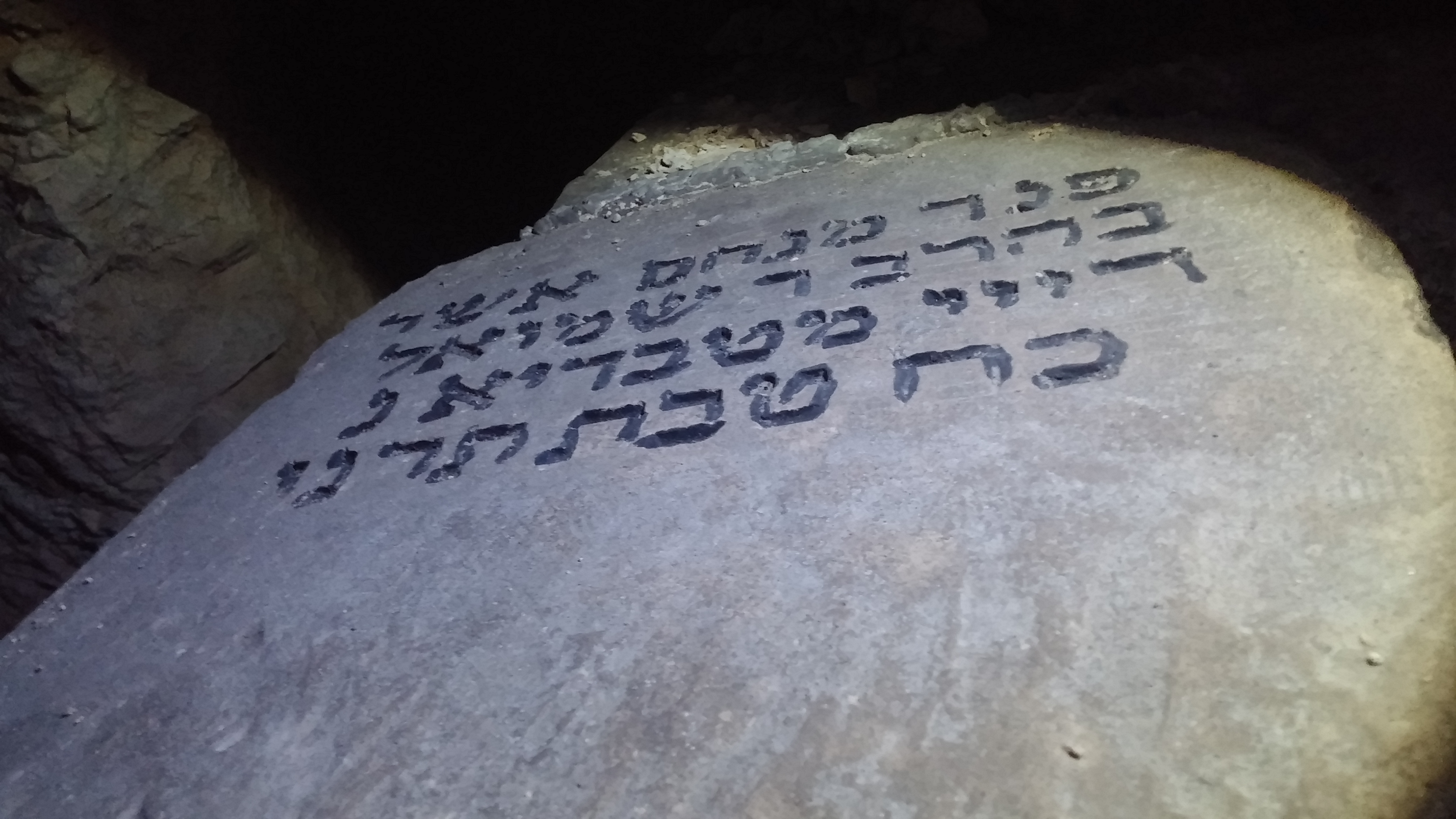 מצבת קברו של ר' מנחם אשר ברש"ד בבית הקברות העתיק בצפת